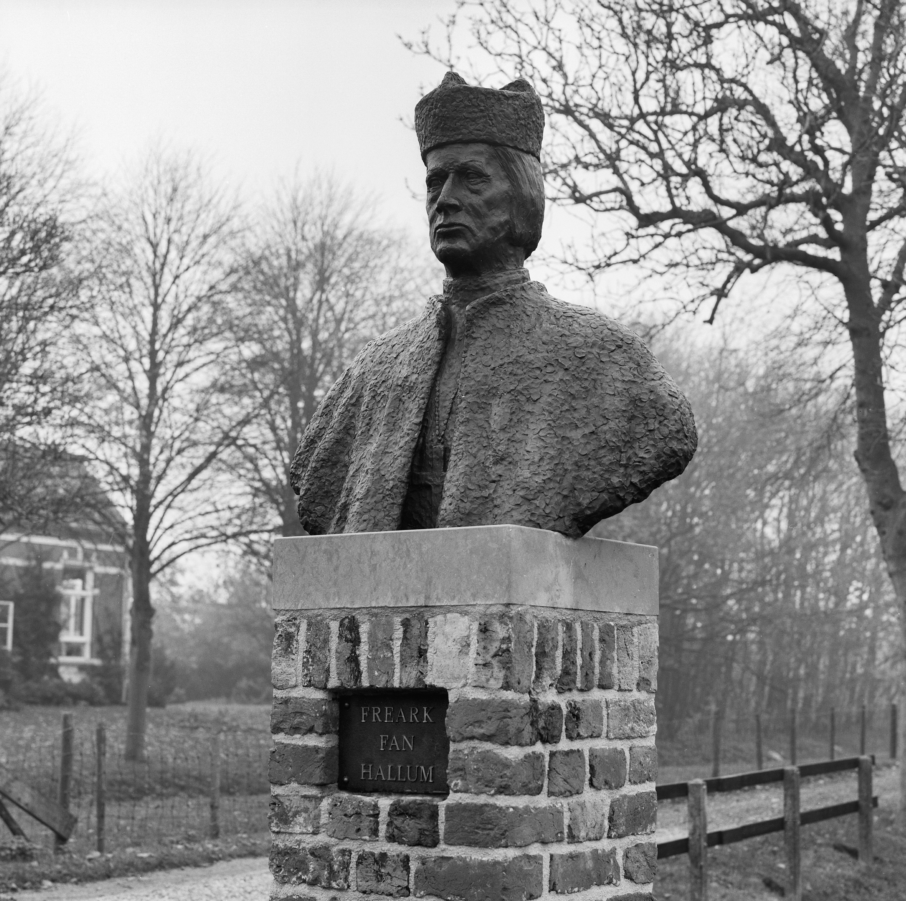 Beeld van Fred. van Mari‰ngaarde